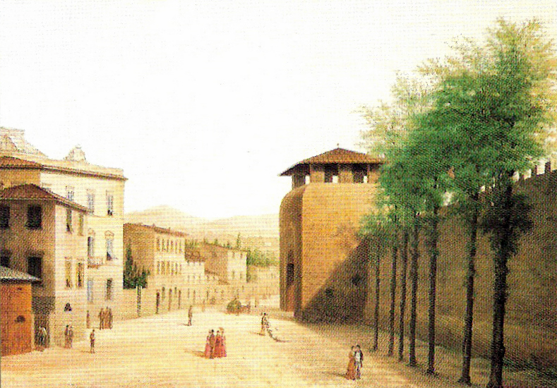 Porta al Prato (esterno)